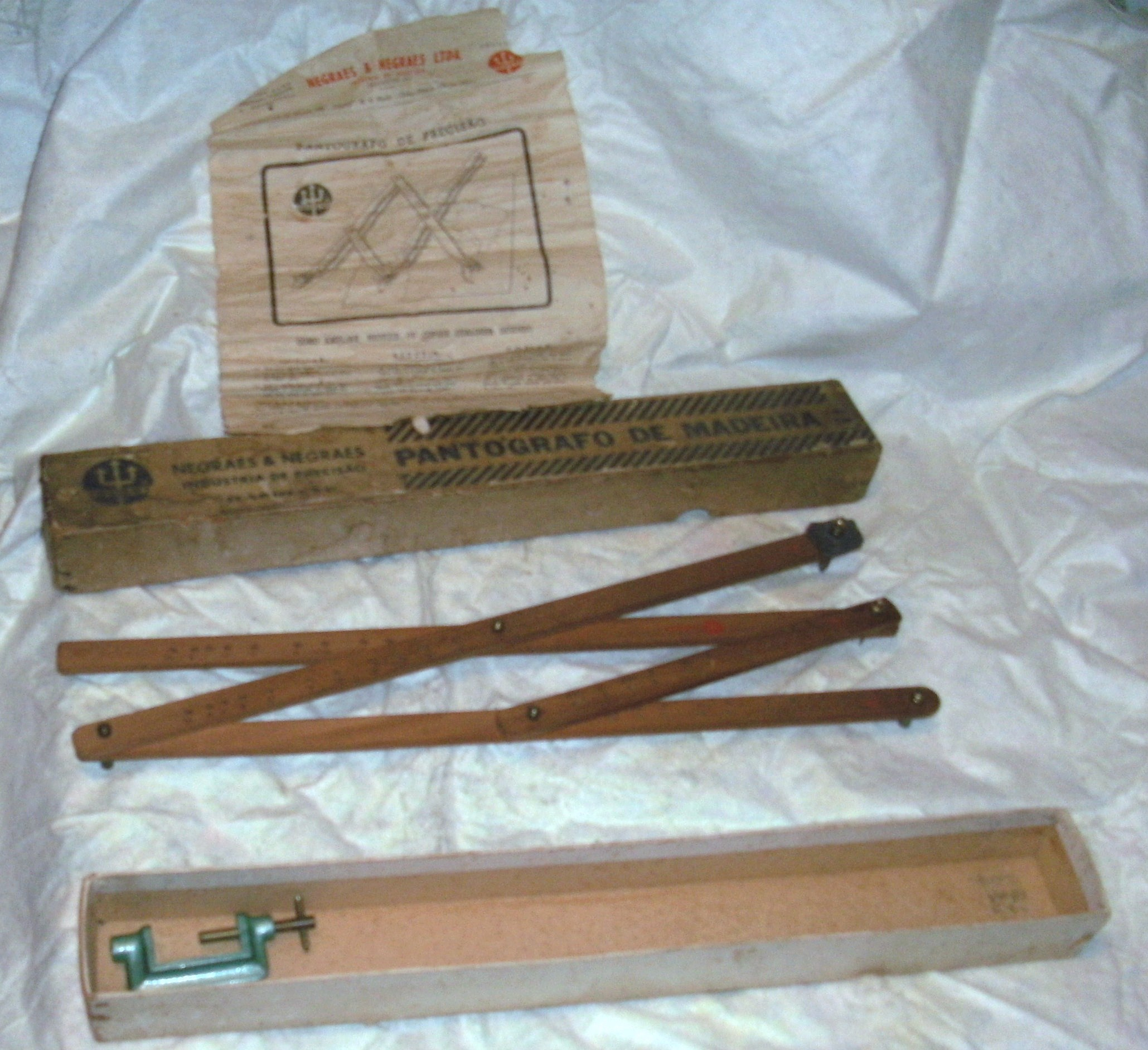 Pantografo trident da década de 1950